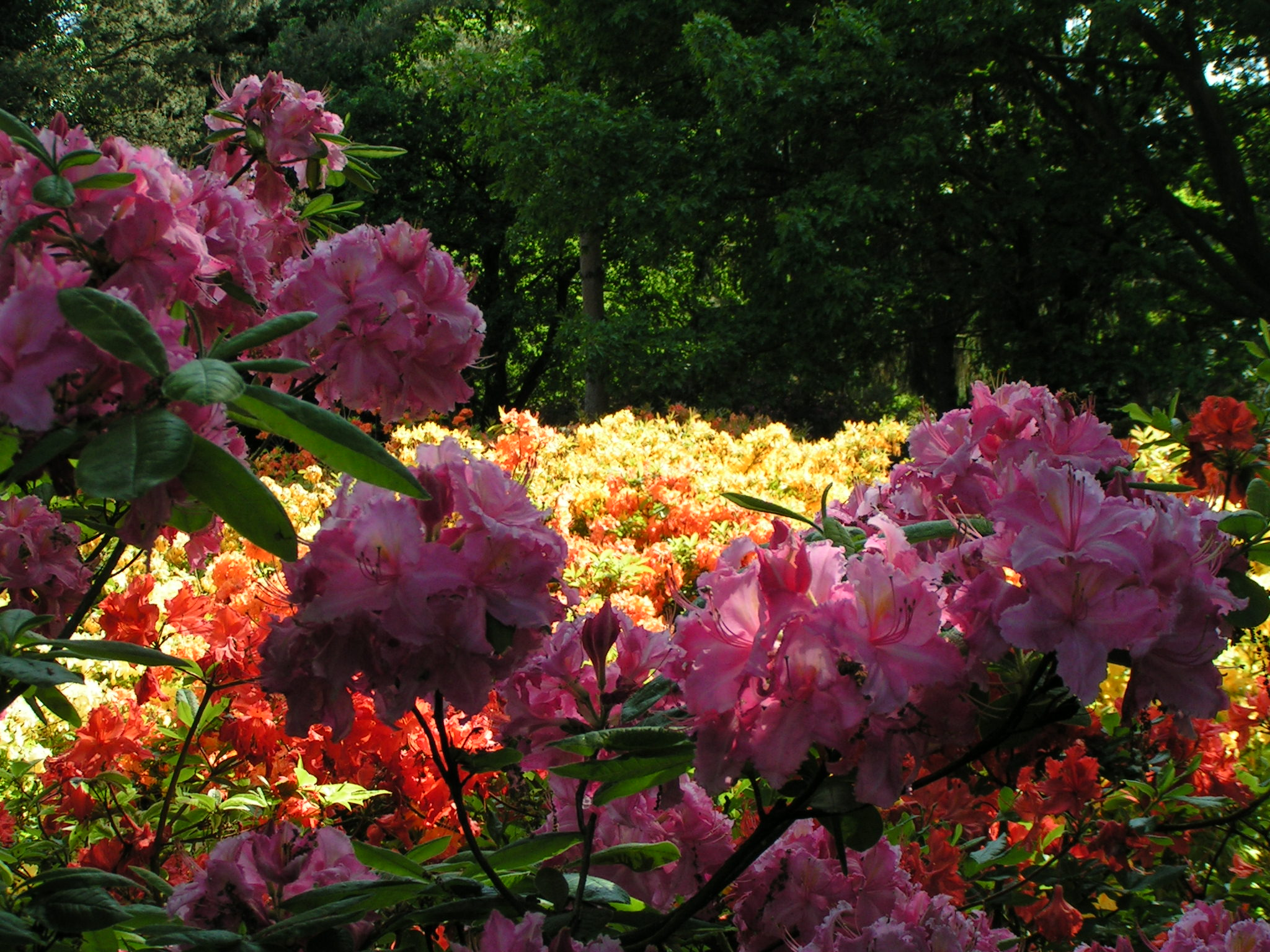 Blühende Rhododendren und Azaleen im Park der Gärten in Bad Zwischenahn-Rostrup